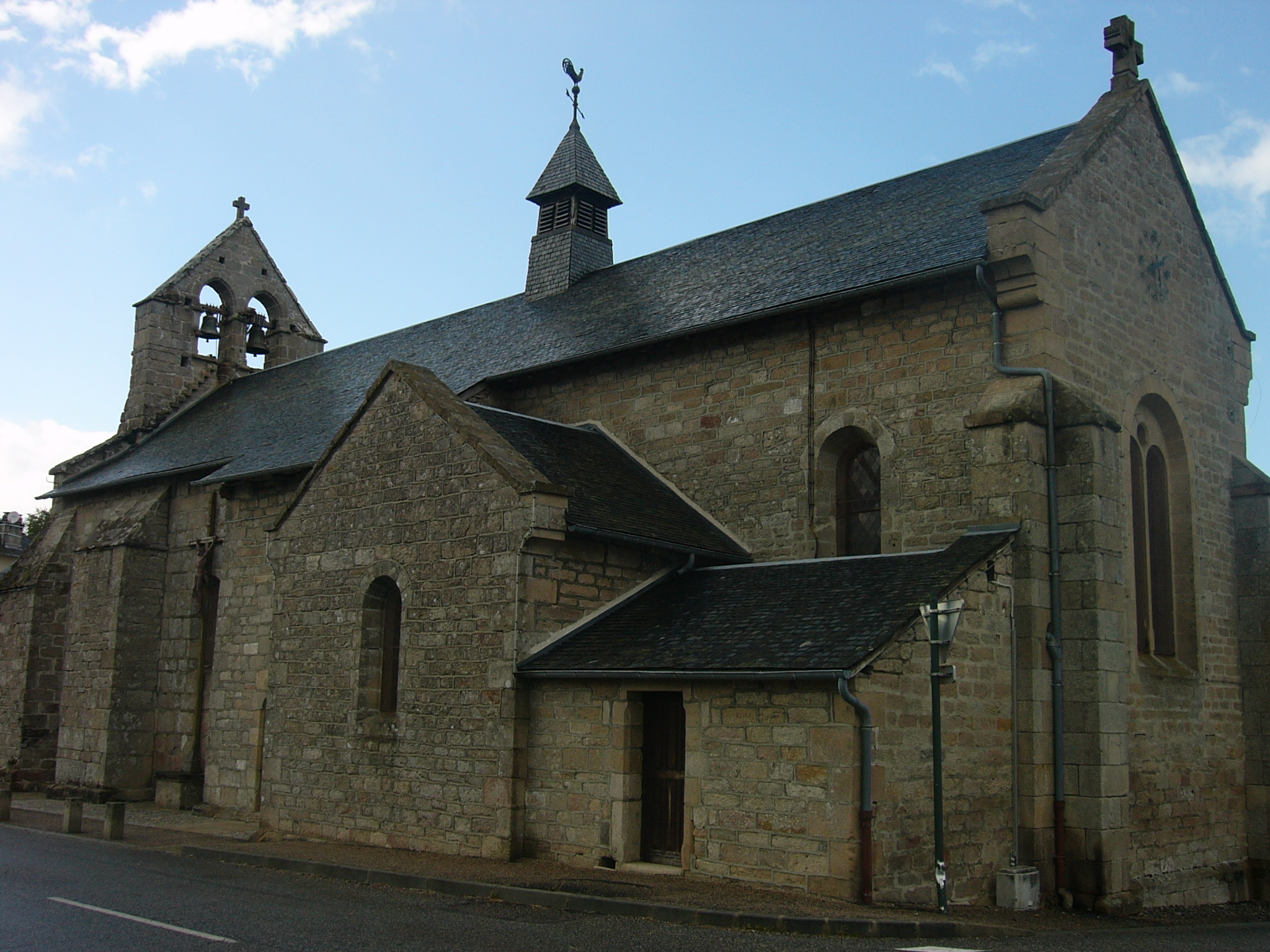 Église de Saint yrieix le dejalat en Corrèze